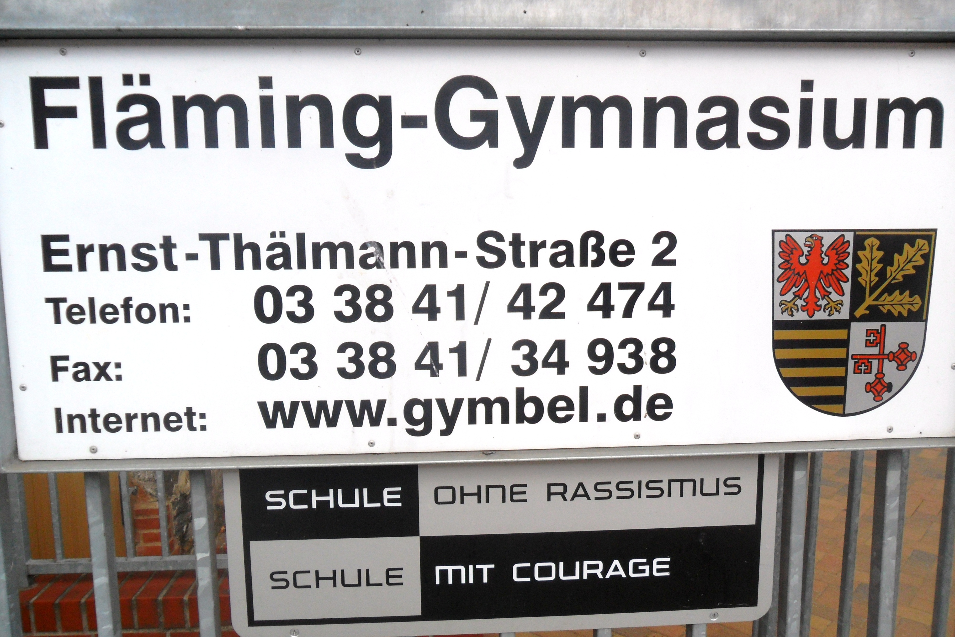 Schild beim Eingang des Fläming Gymnasium